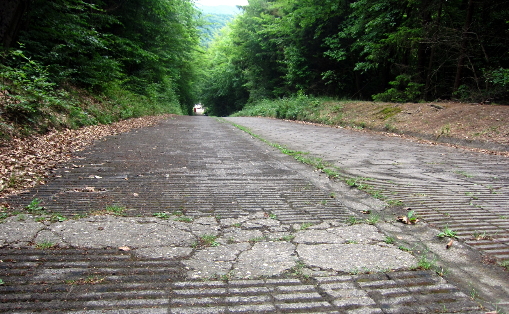 Die "Steilstrecke" an der Nürburgring-Nordschleife zwischen den Streckenbereichen "Klostertal" und "Hohe Acht" wurde 1926-1928 als mögliche Abkürzung der Strecke erbaut.